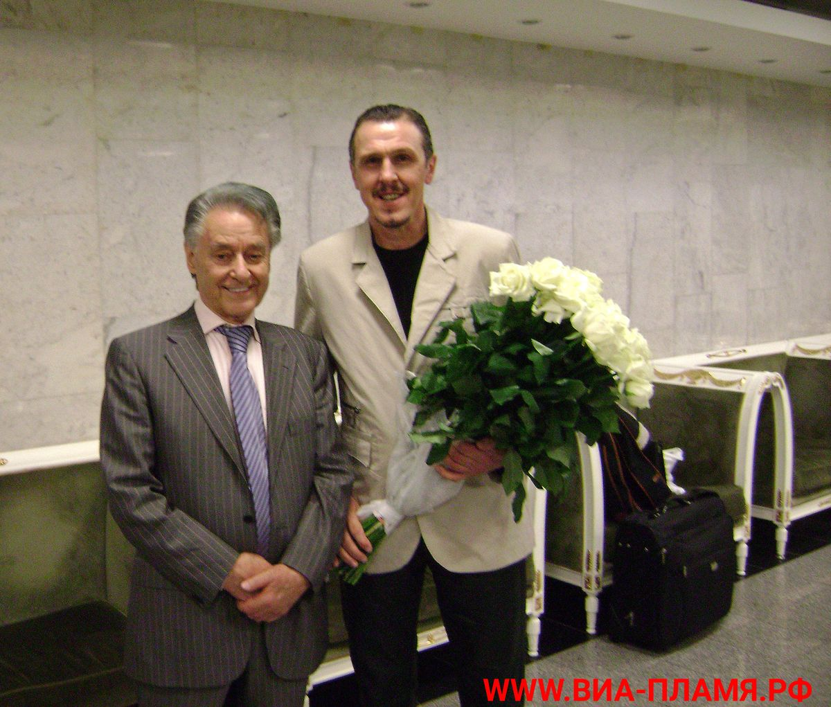 АЛЕКСАНДР ЕВДОКИМОВ (ВИА «ПЛАМЯ») и АНДРЕЙ ДЕМЕНТЬЕВ (ГОСУДАРСТВЕННЫЙ КРЕМЛЁВСКИЙ ДВОРЕЦ). ВИА «Пламя» под руководством Юлии Ариничевой.